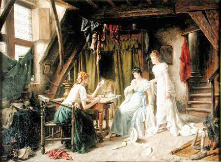 Gérard Portielje (1856-1929): D'Kaarteschléisch seet d'Zukunft viraus.